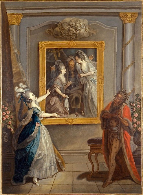 Gramont: Das "magische Bild" aus der Comédie-ballet "Zémire et Azor" (3. Akt, Szene 6) von André-Ernest-Modeste Grétry (1741–1813, Musik) und Jean-François Marmontel (1723–1799, Libretto), undatiert (Uraufführung: 6. 11. 1771). Öl auf Holz. Bibliothèque nationale de France, Bibliothèque-musée de l'Opéra, Paris, MUSEE 1669.